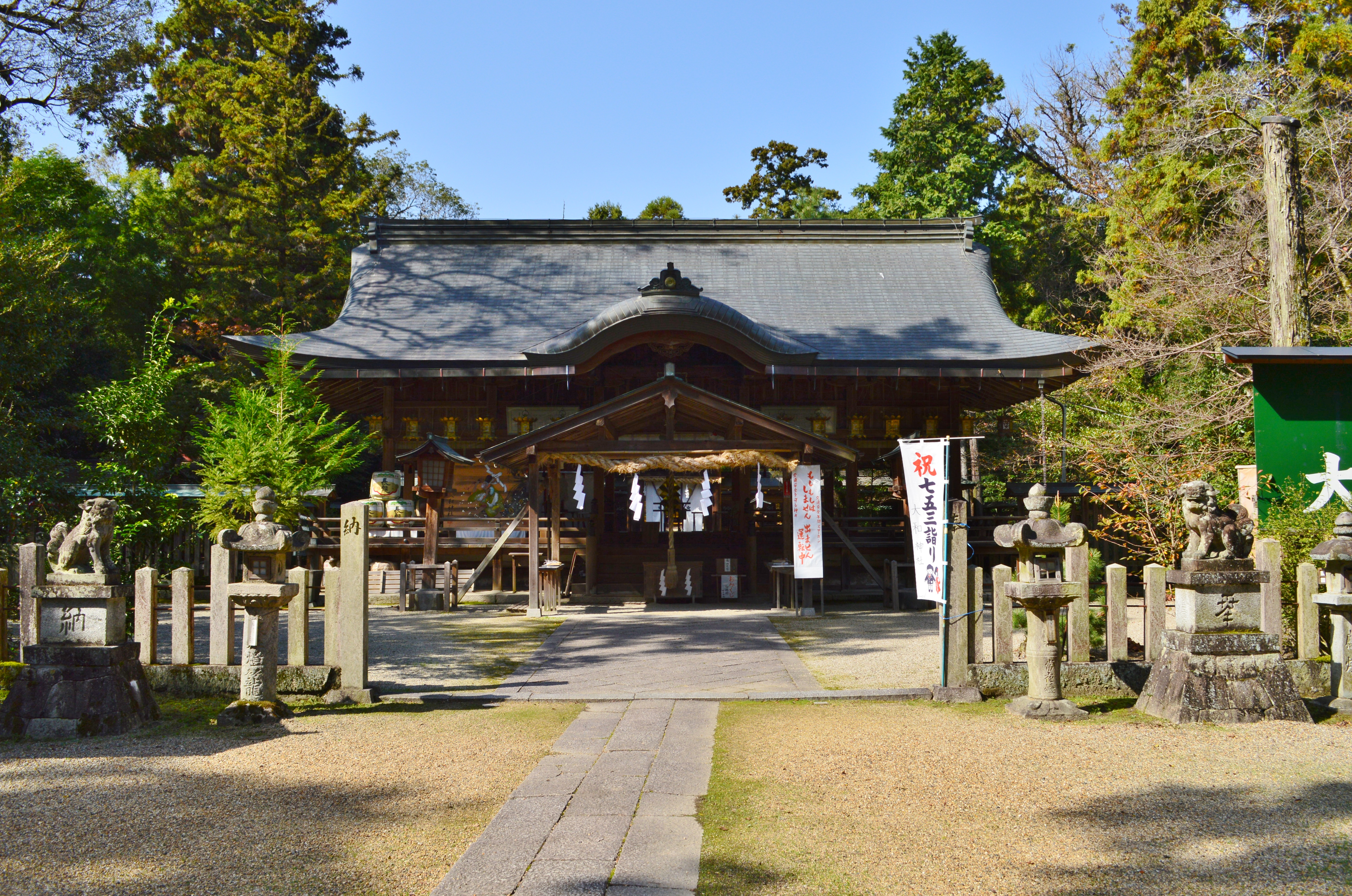 大和神社 拝殿